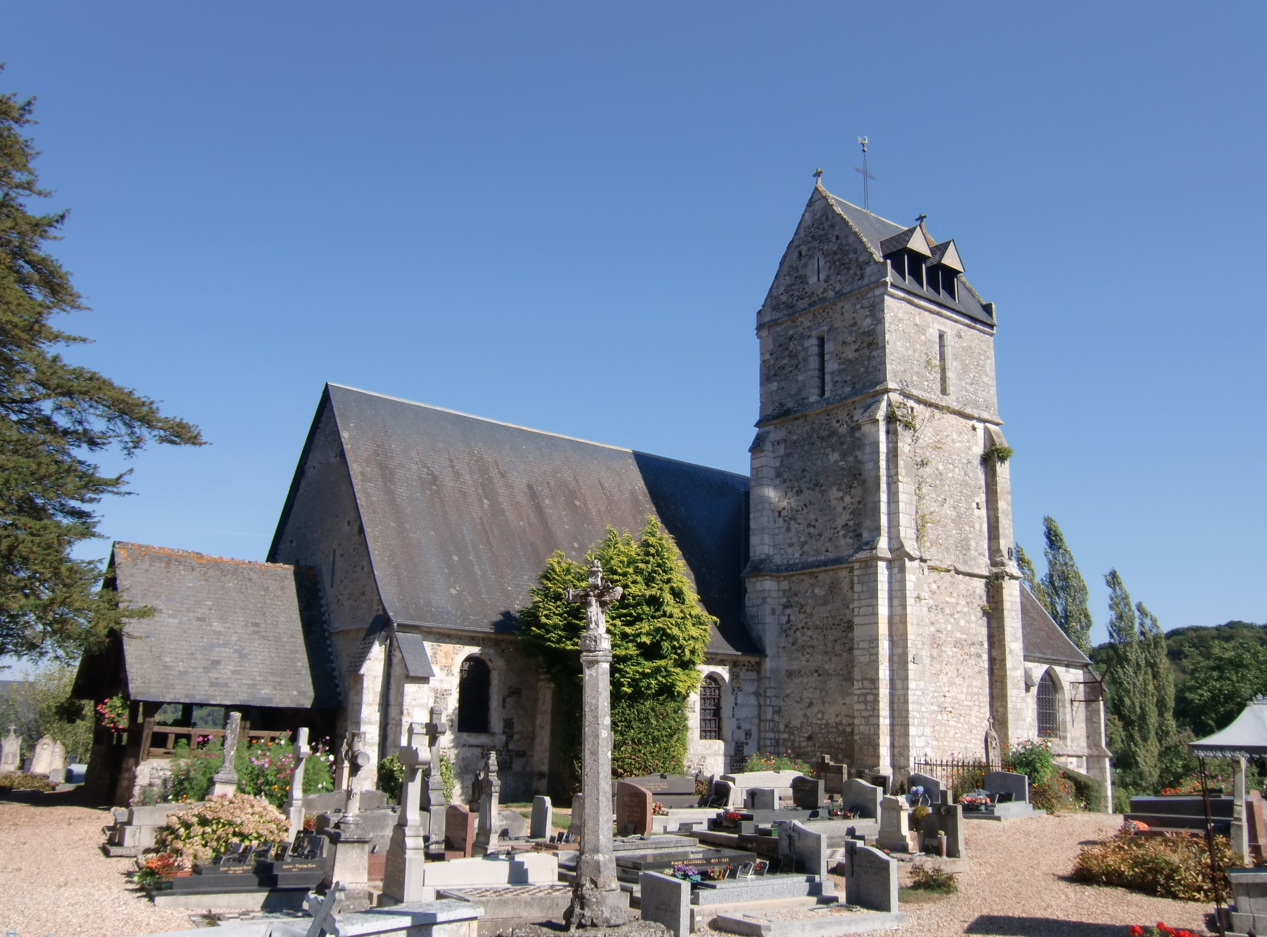 église de Fort-Moville et croix de cimetière de 1688 (Eure, Normandie, France)